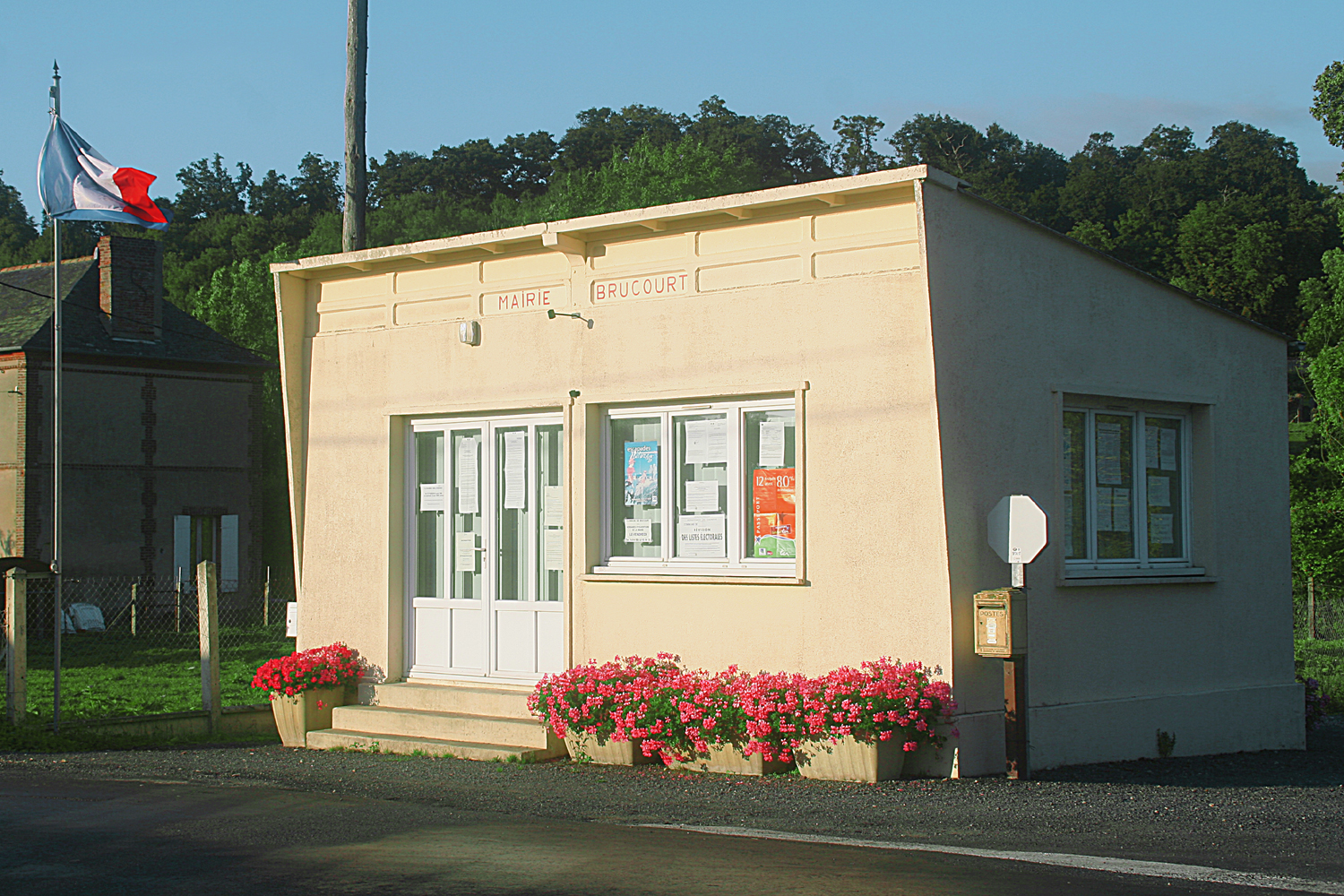 Mairie de Brucourt jusqu'en 2009 (Calvados, France)